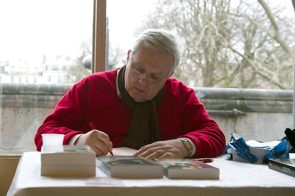 Salon des écrivains bretons à la mairie du 14e arrondissement de Paris